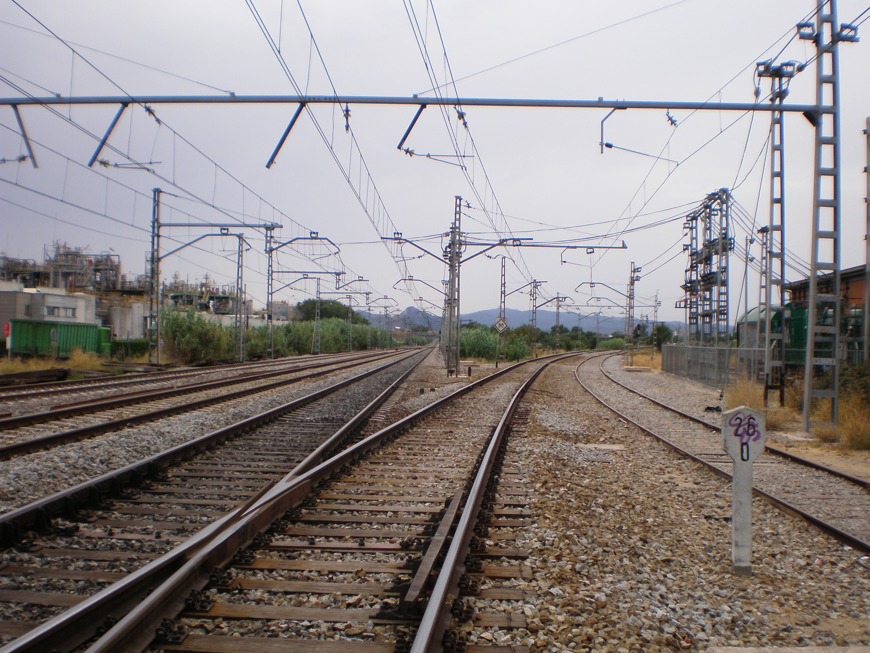 Estació de Mollet - Sant Fost: Inici de la línia de ferrocarril Mollet - Papiol / Castellbisbal (vies que surten cap a la dreta) a la línia Barcelona - Granollers - Portbou - Cerbère. Actualment, des de la construcció del Nus de Mollet, en aquest ramal de connexió, tots els trens circulen, normalment, en sentit Castellbisbal, però abans, quan es va prendre aquesta fotografia, era un tram de via única entre Mollet i Santa Perpètua, de manera que els trens circulaven en els dos sentits.